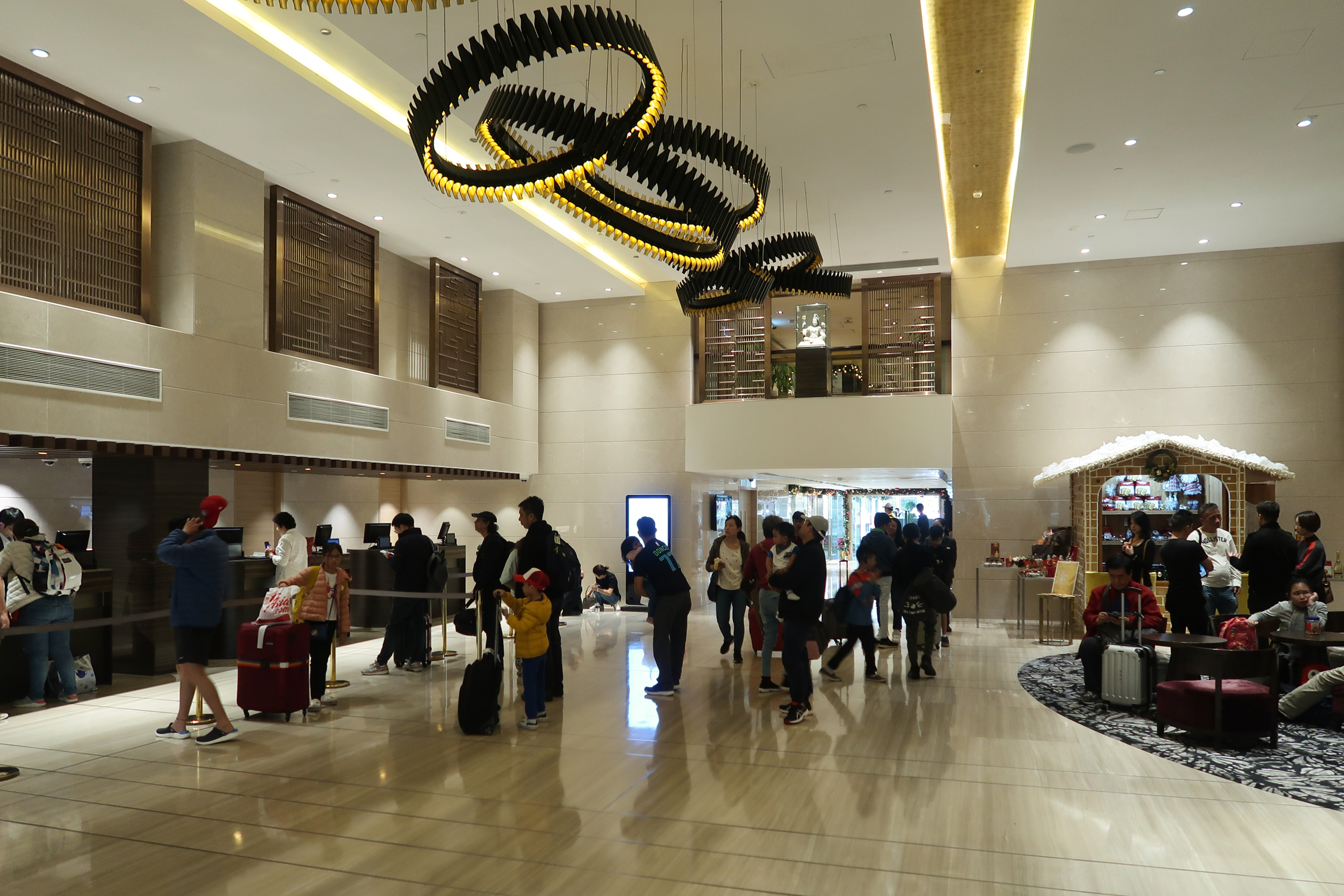 Holiday Inn Golden Mile Hong Kong Lobby